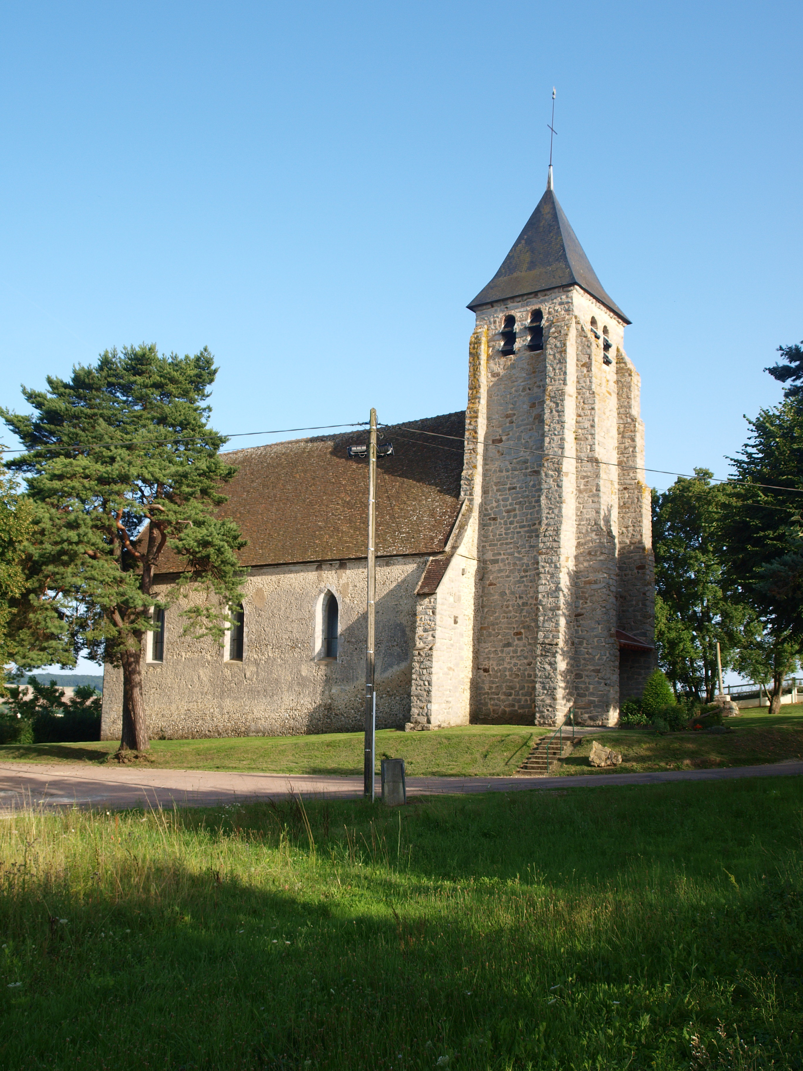 Étigny (Yonne, France) ; église